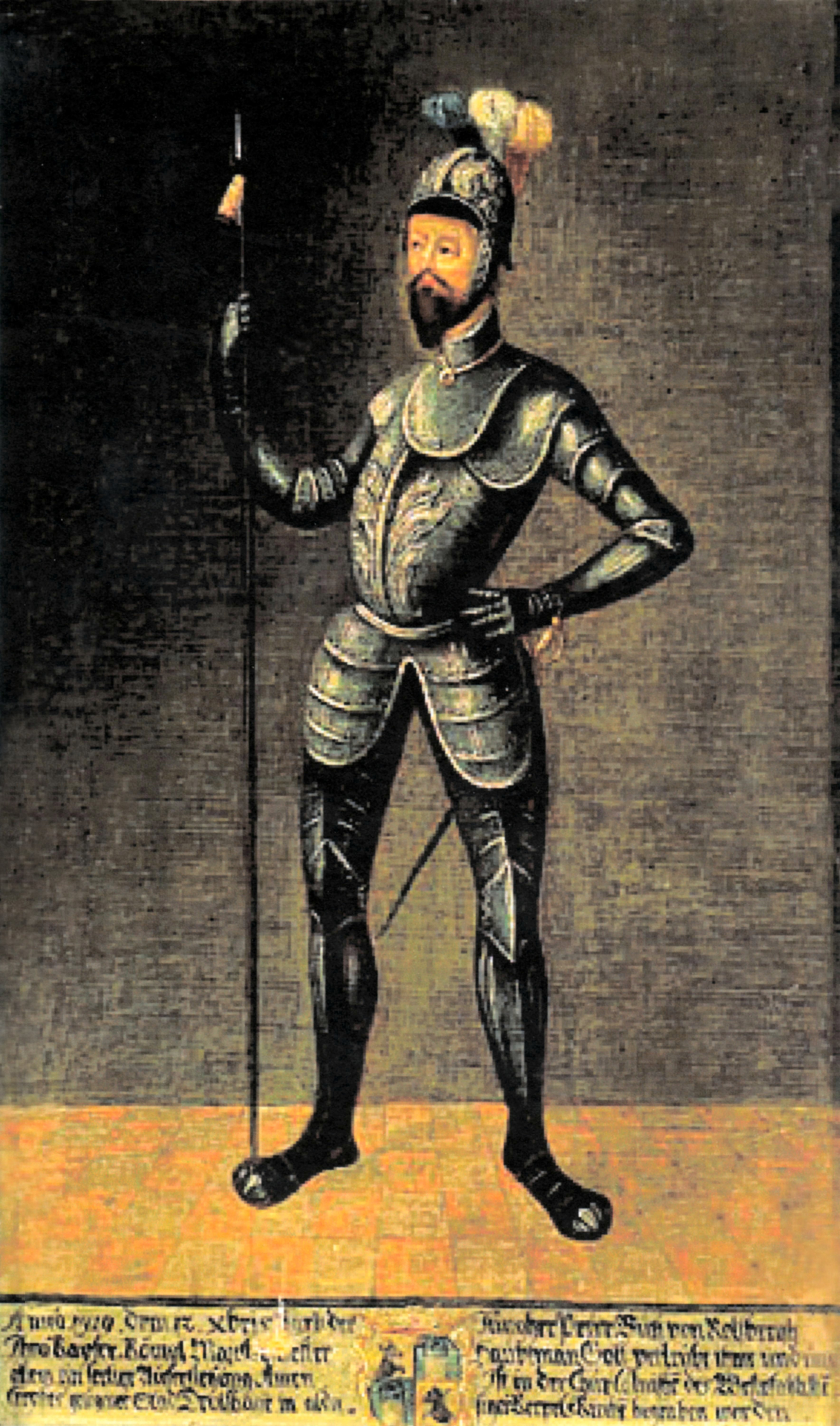 Peter Butz von Rohlsbergh (Rolsberg) mit Wappen zu Beginn des 17. Jahrhunderts, seit 2014 im Besitz des Heimatvereins für das Drolshagener Land e.V.